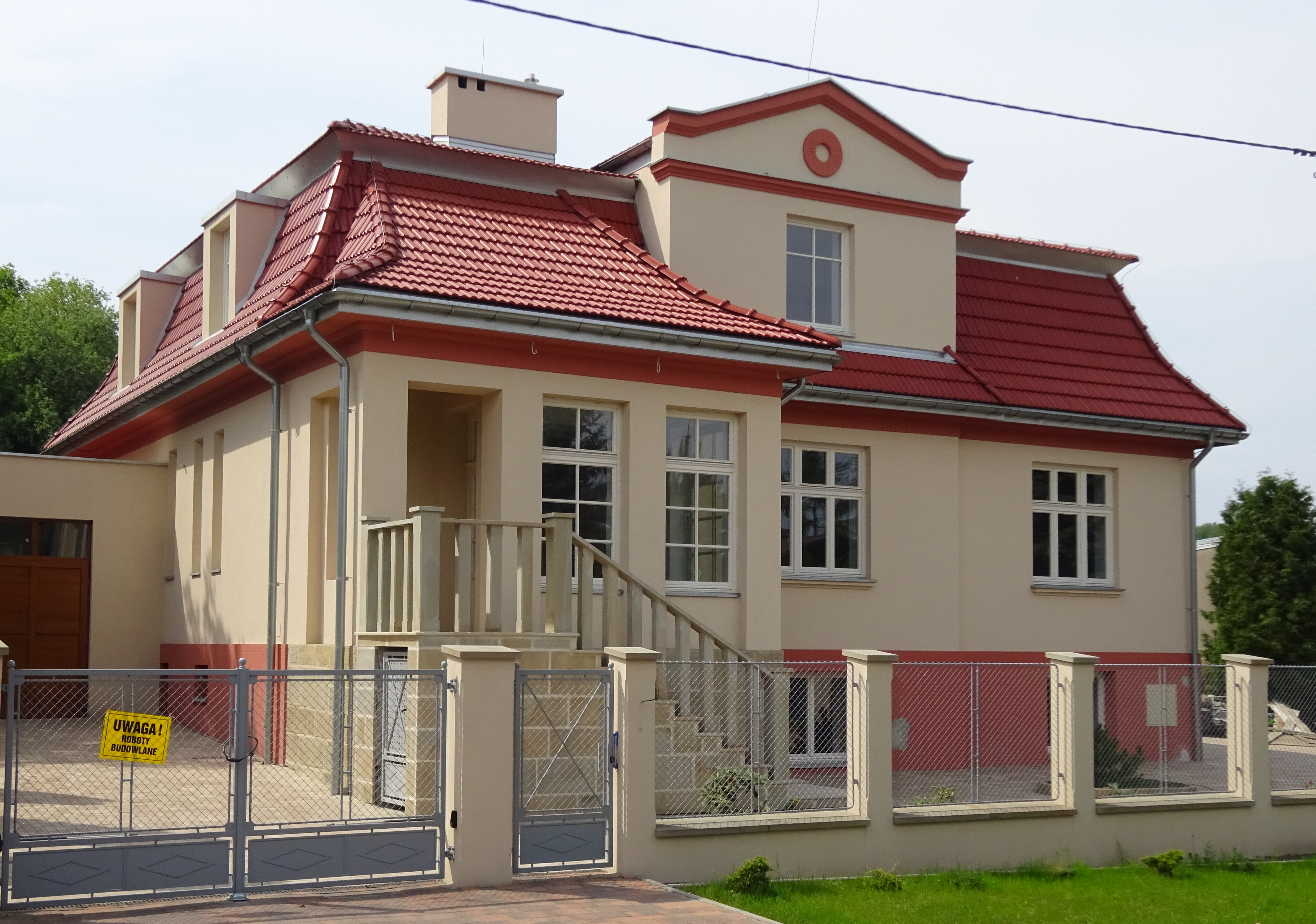 Willa komendanta obozu Plaszow Amona Götha, tzw. Czerwony Dom, czy jak oryginalnie nazwana przed wojną - Willa Pod Skałą przy ulicy Wiktora Heltmana 22 w Krakowie-Podgórzu. 2018